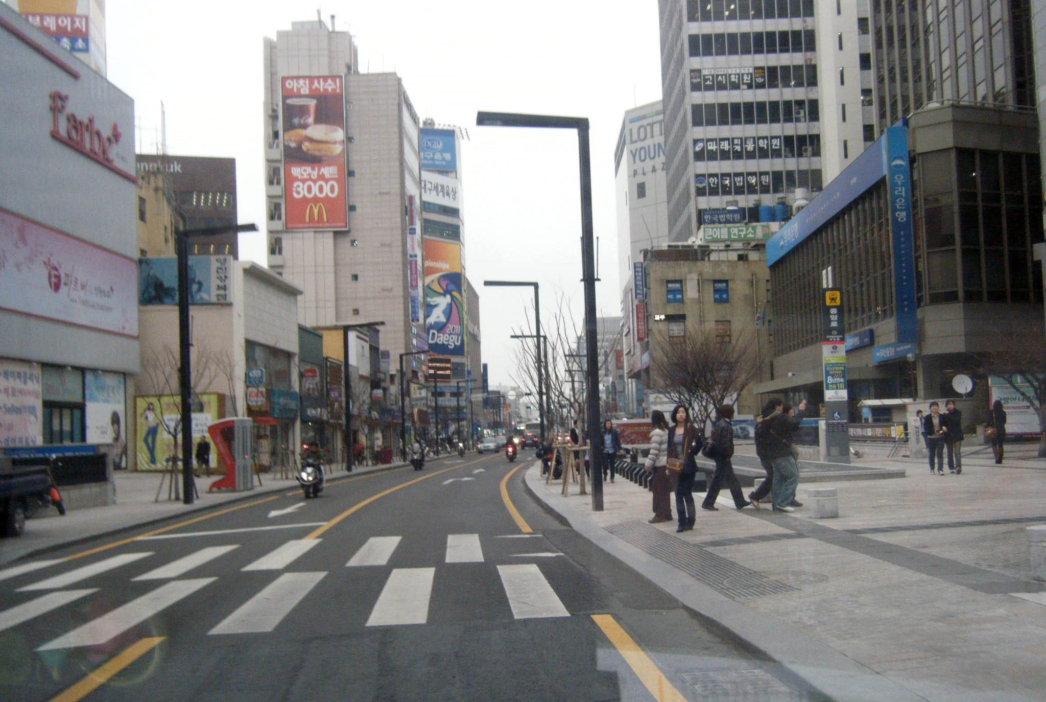 대구지하철 1호선 중앙로역 지하철 입구